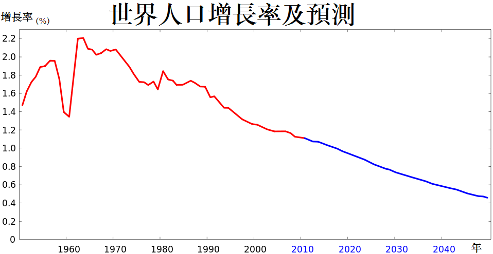 世界人口增長率及預測，繁體版